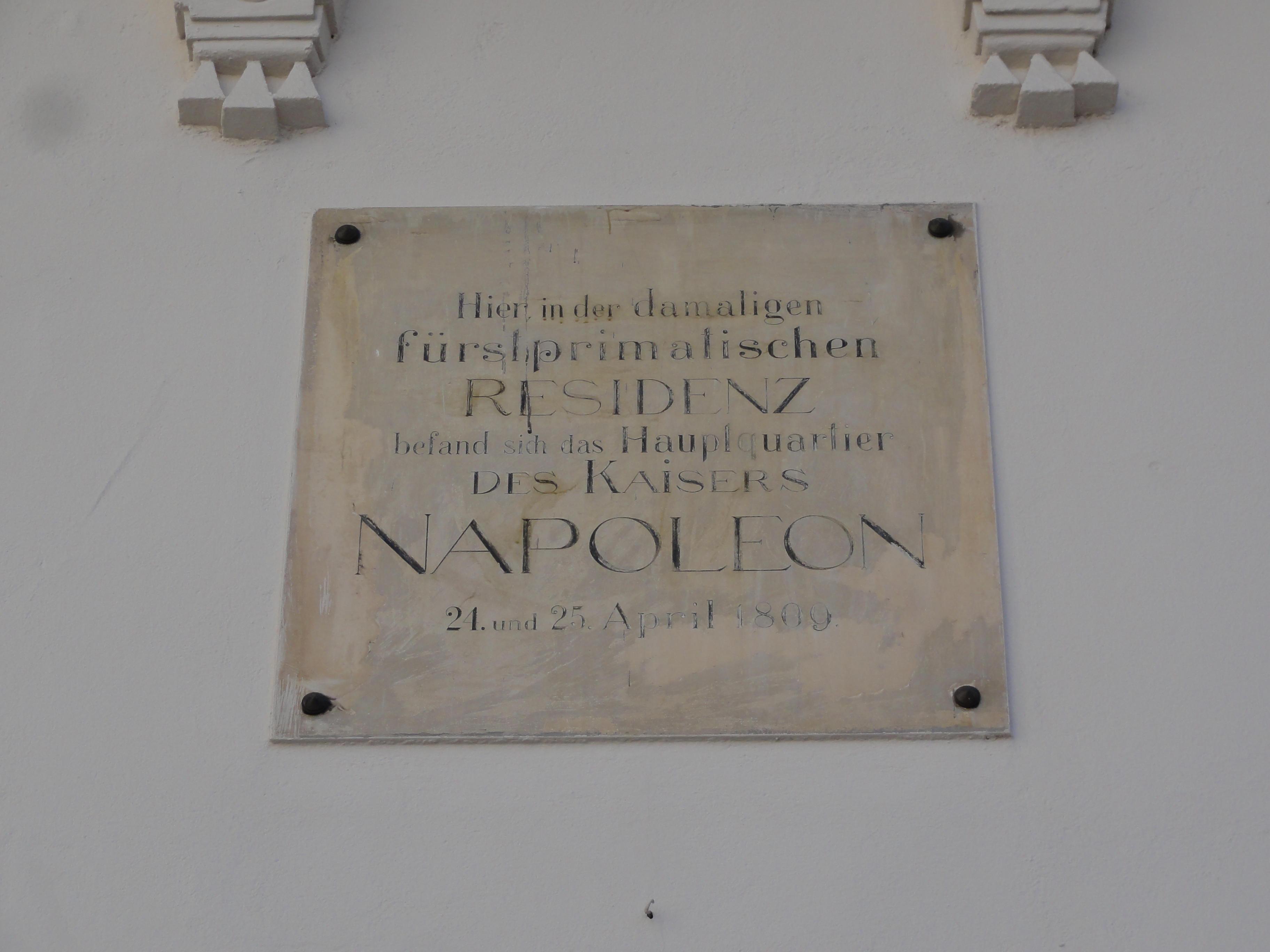 Regensburg - Tafel an der Ehemaligen Dompropstei Regensburg bzw. Hauptquartier Napoleons. Info GPS data may be inaccurate. EXIF data regarding date and time may be inaccurate.